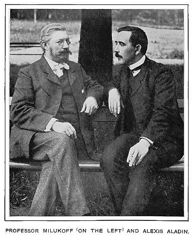 П. Н. Милюков (слева)